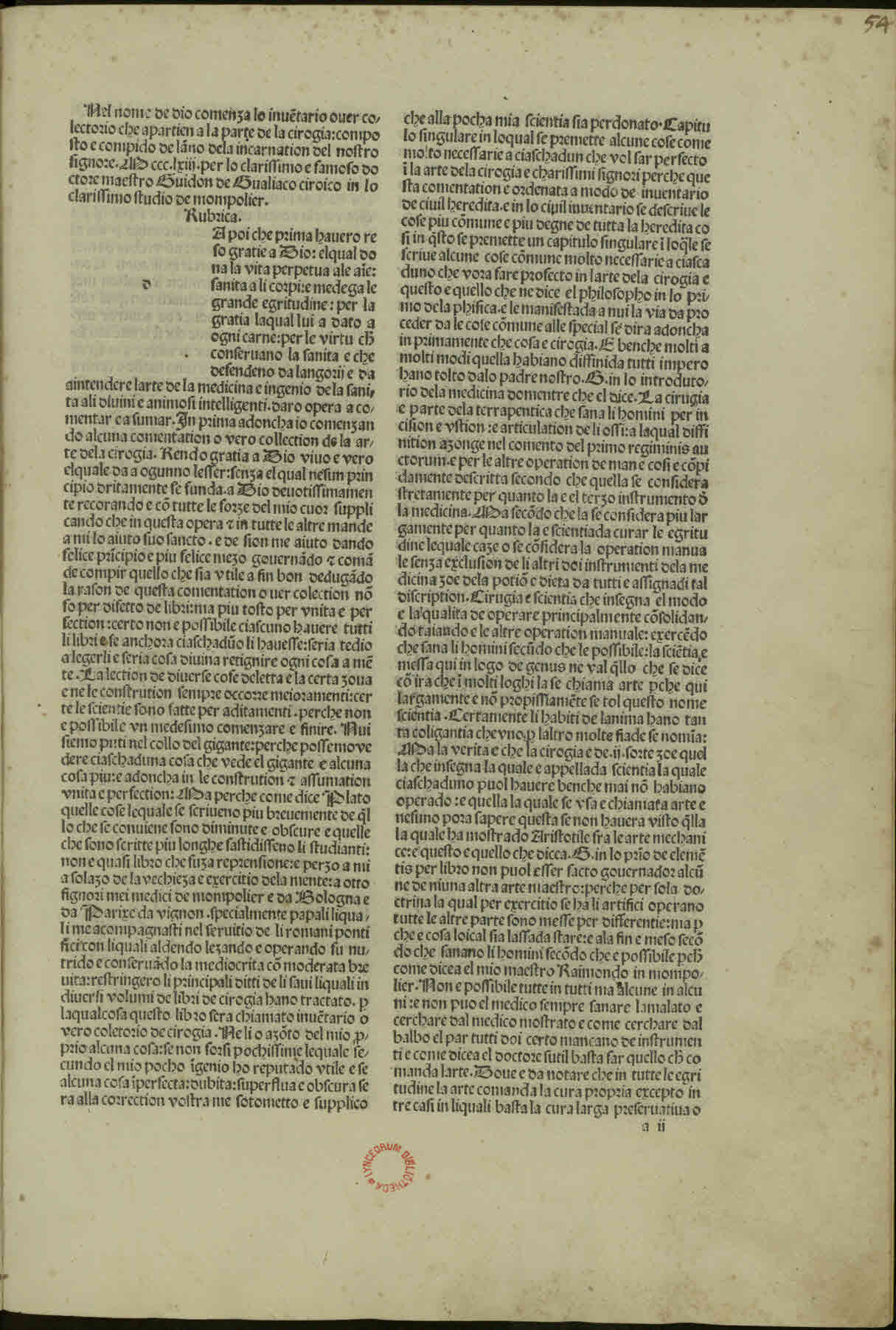 Chirurgia (italiano). - In Venesia : impresso per maistro Piero di Quarengi de Palazago et Zohan Maria de Monte ferato, nel MCCCCLXXXXIII adi XXI del mese di agosto. - 118 c. ; a⁸, b-s⁶, t⁸ ; fol. - Manca la c. t8 .